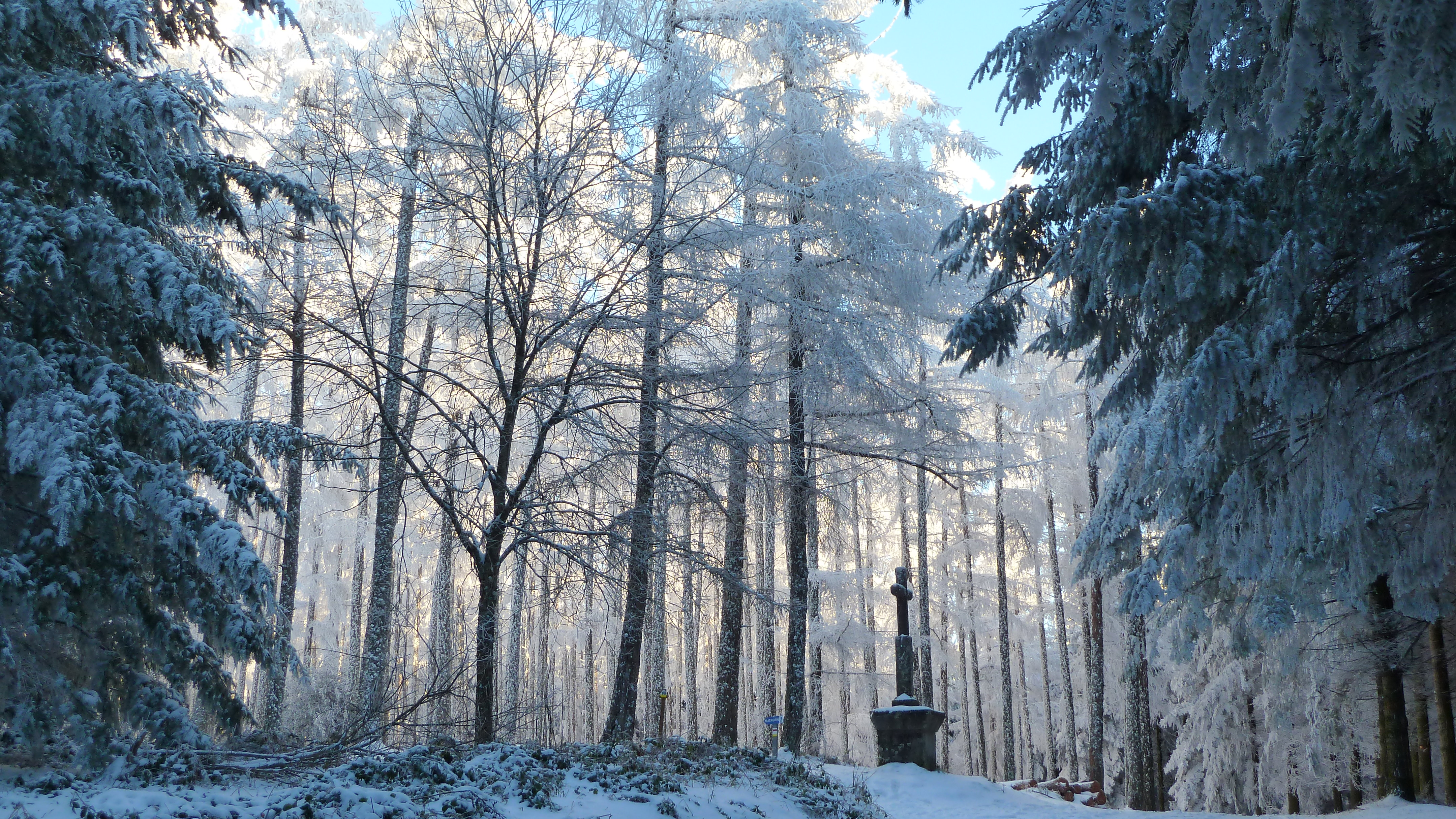 La croix de Monsieur Jean à Violay en hiver.